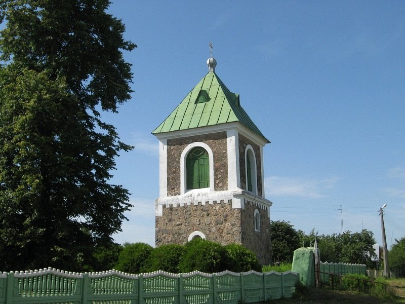 Вялікія Жухавічы. Петрапаўлаўская царква. Званіца